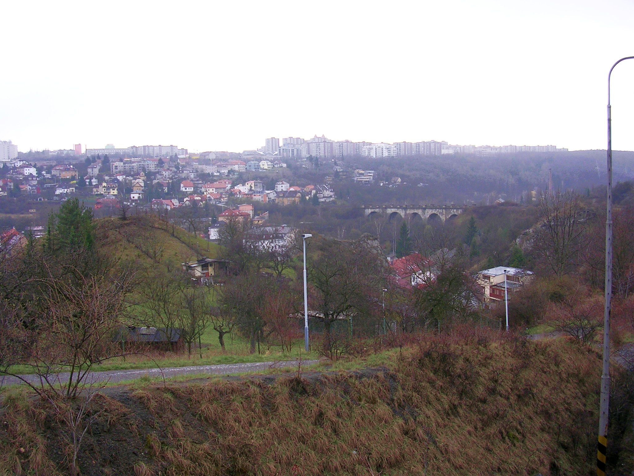 Hlubočepský viadukt na trati č. 122, pohled z lávky u hřbitova